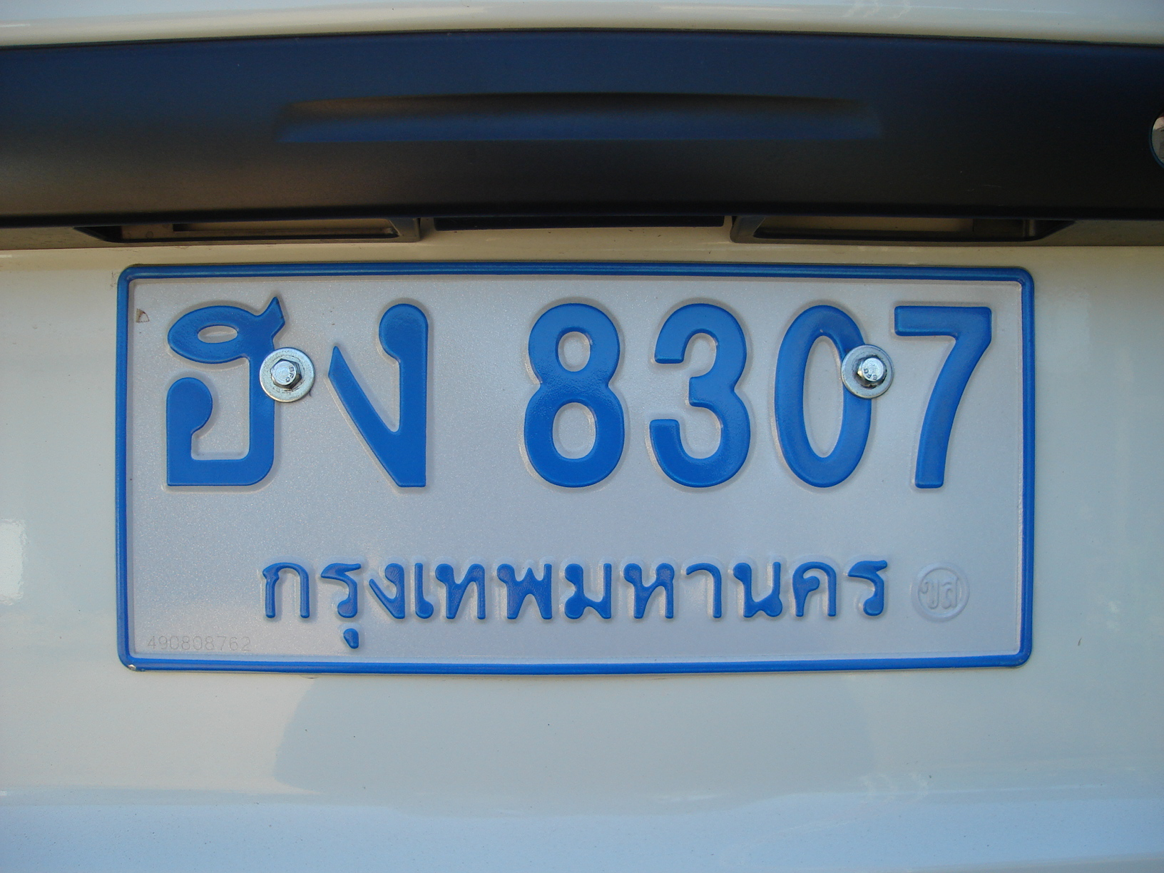 ทะเบียนรถยนต์ รถยนต์นั่งส่วนบุคคลเกิน 7 ที่นั่ง (คน) (โดยส่วนมากจะเป็นรถตู้) Thai personal vehicles (more than seven seats) plate (usually vans)